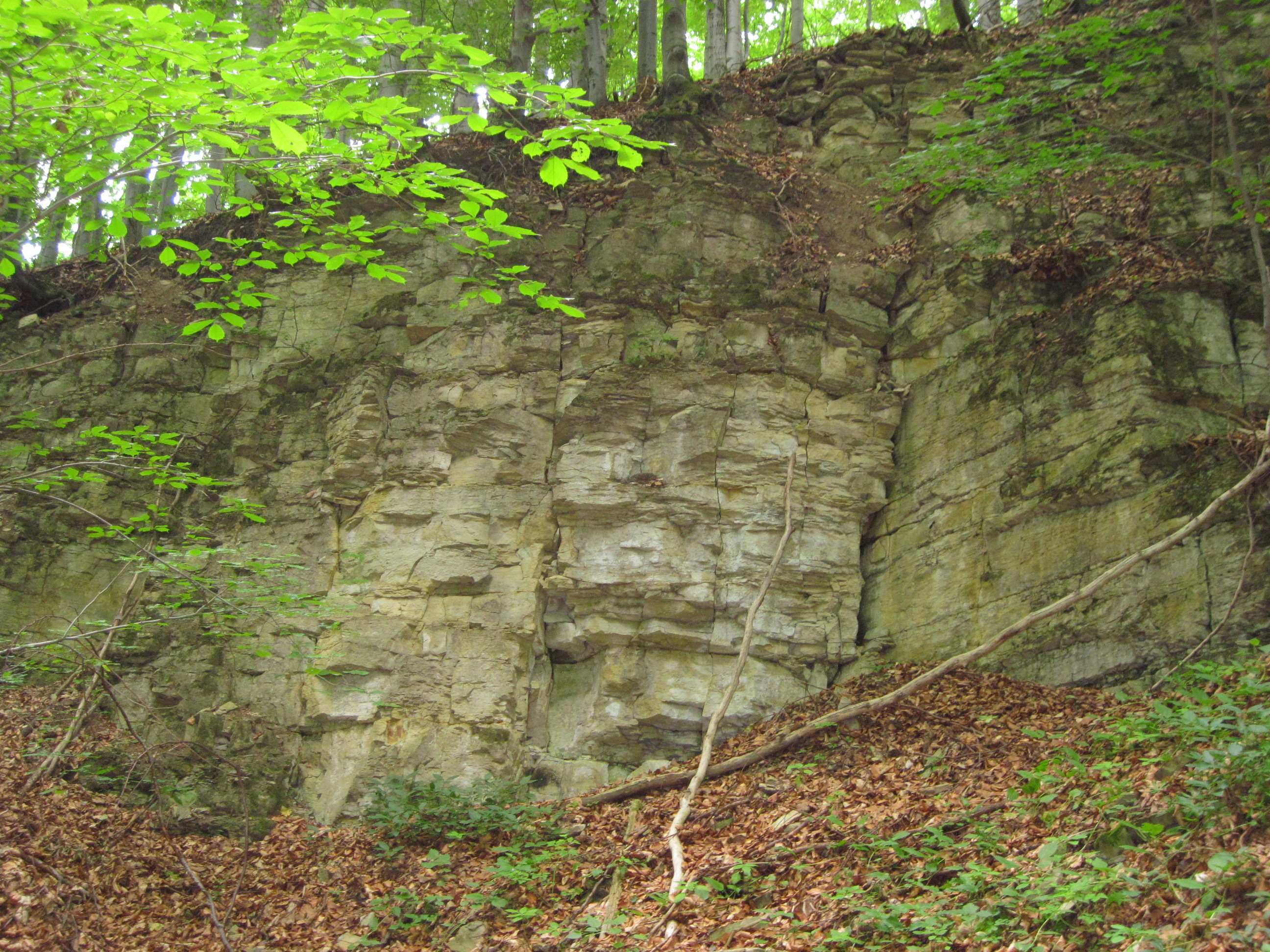 Skála nedaleko Mariánského obrazu Project: Chráněná území.